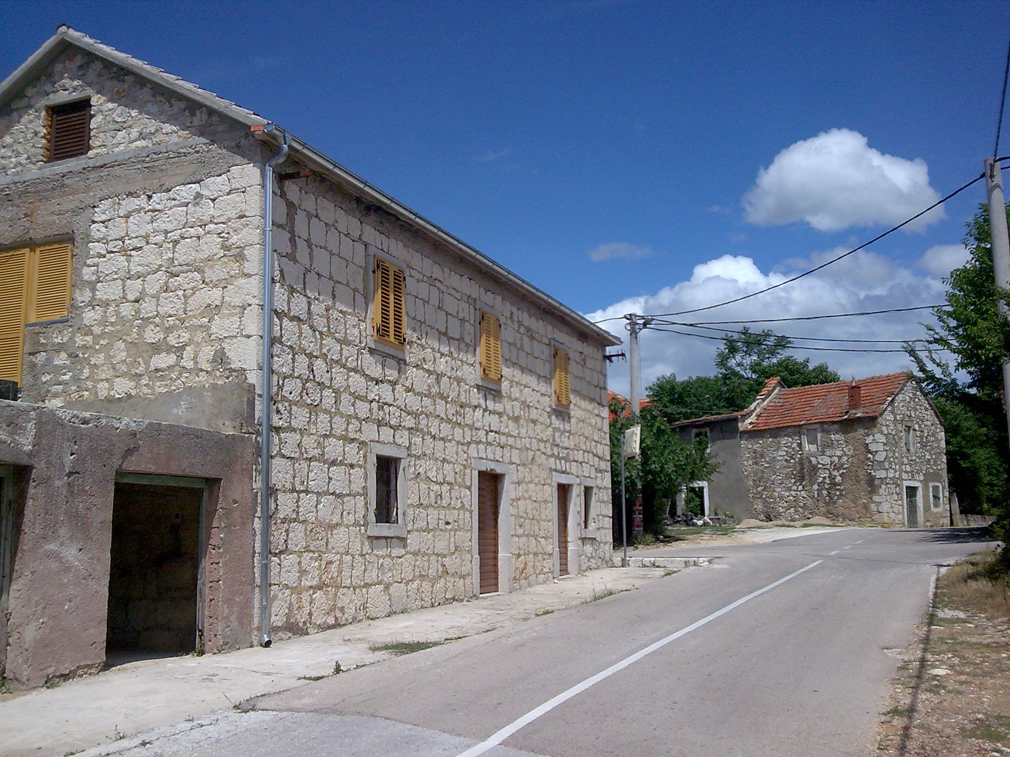 Miočić, Centar